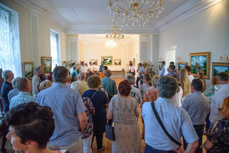 Izložba u dvorcu 2017.